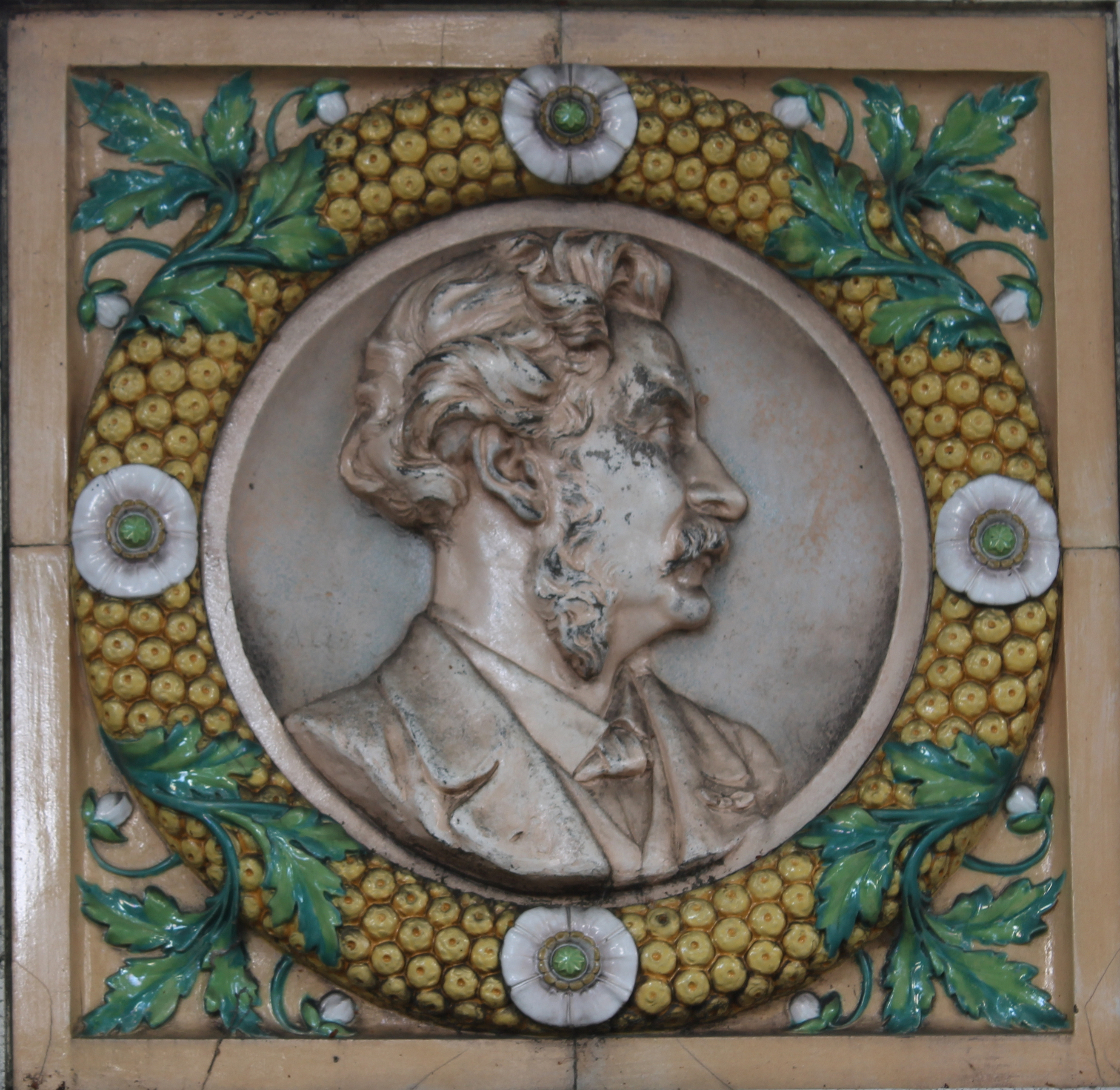 Sépulture du céramiste Jules Paul Loebnitz (1836-1895) et Robert Le Besnerais (1893-1948), premier directeur général de la SNCF.